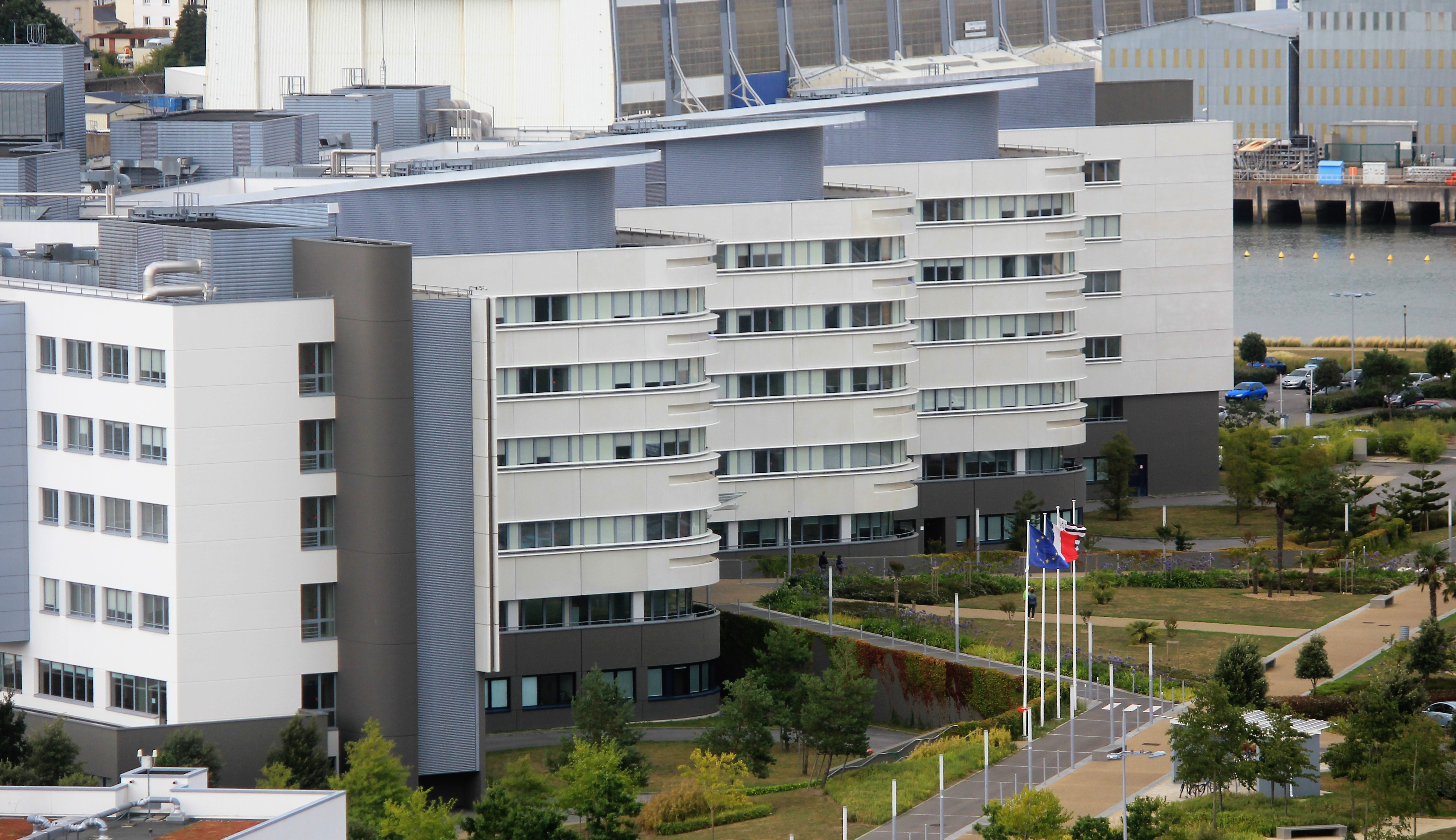 Vue de Lorient depuis le clocher de l'Église Notre-Dame-de-Victoire.